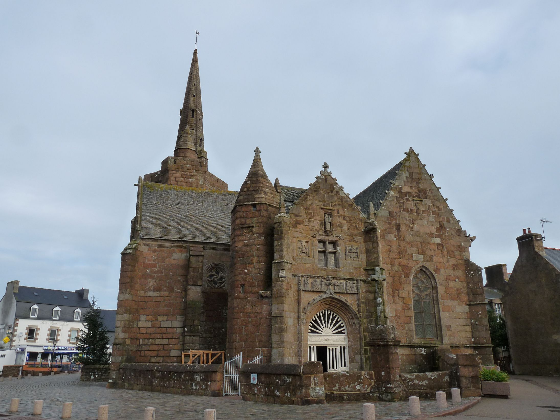 Chapelle Notre-Dame de La Clarté, commune de Perros-Guirec, (Côtes d'Armor)